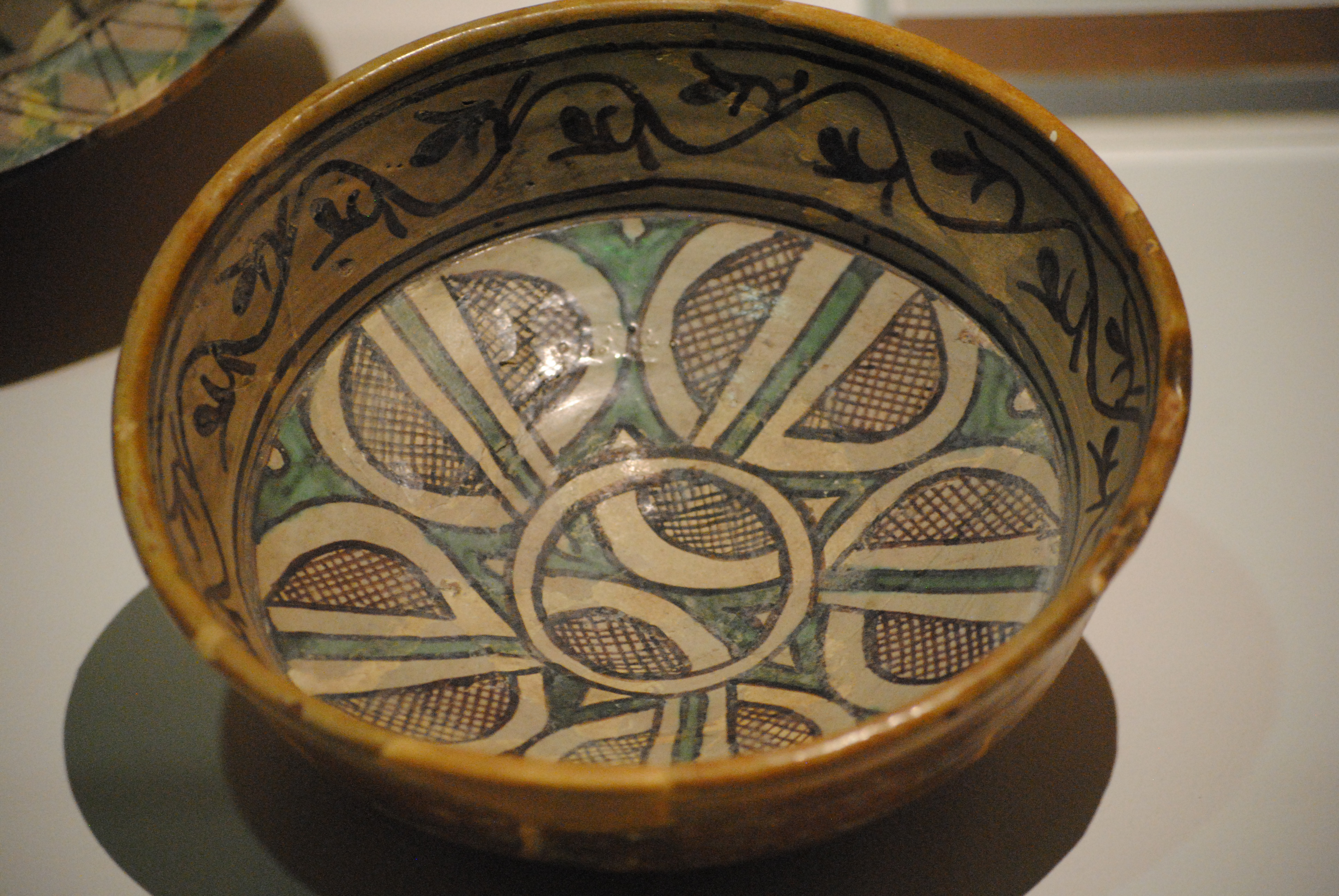 Scodella in maiolica arcaica di produzione pisana della prima metà del XIII secolo e usata come bacino ceramico (chiesa di Santa Cecilia, Pisa) - Museo nazionale di San Matteo.